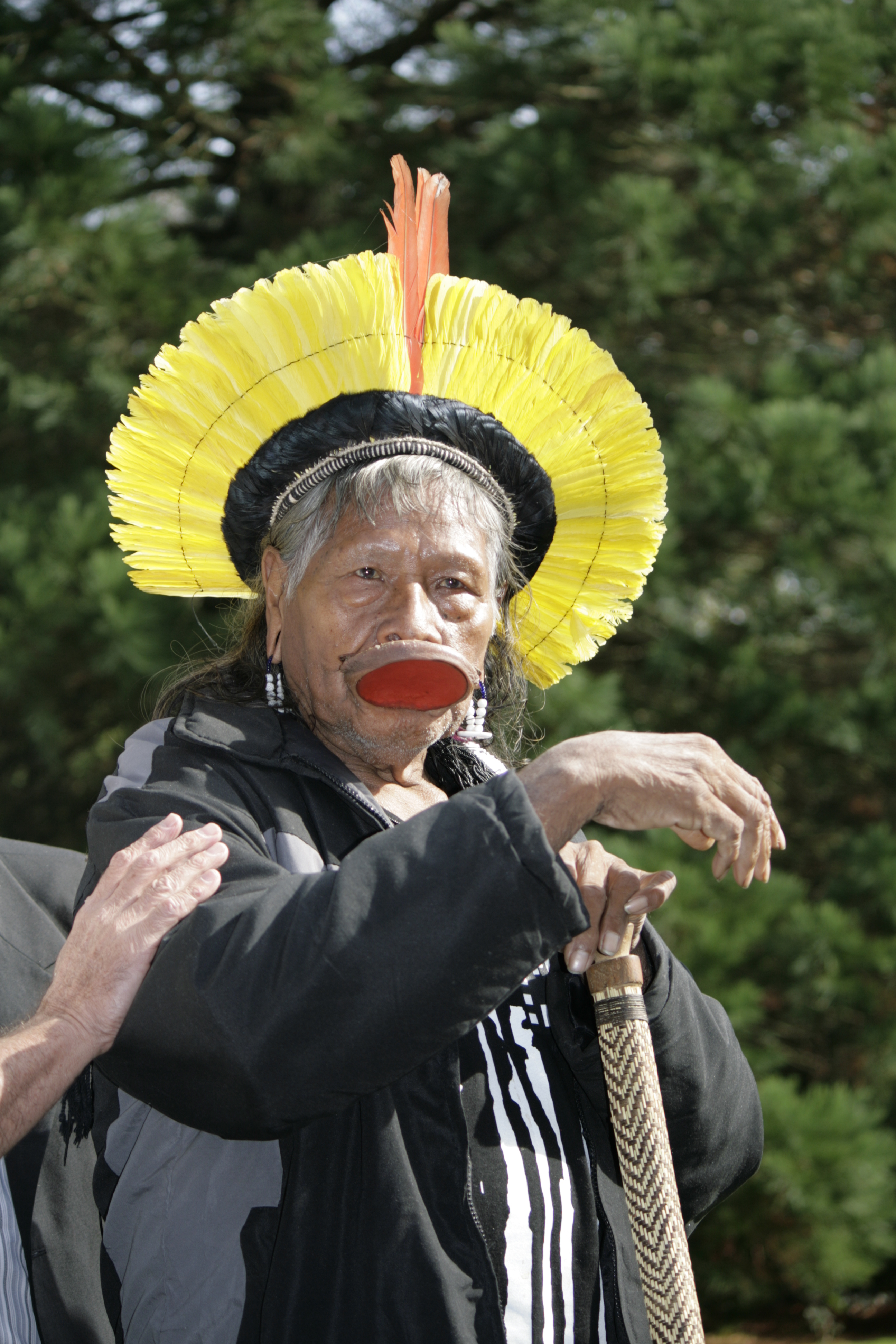 Raoni lors de sa visite au Château de Cheverny